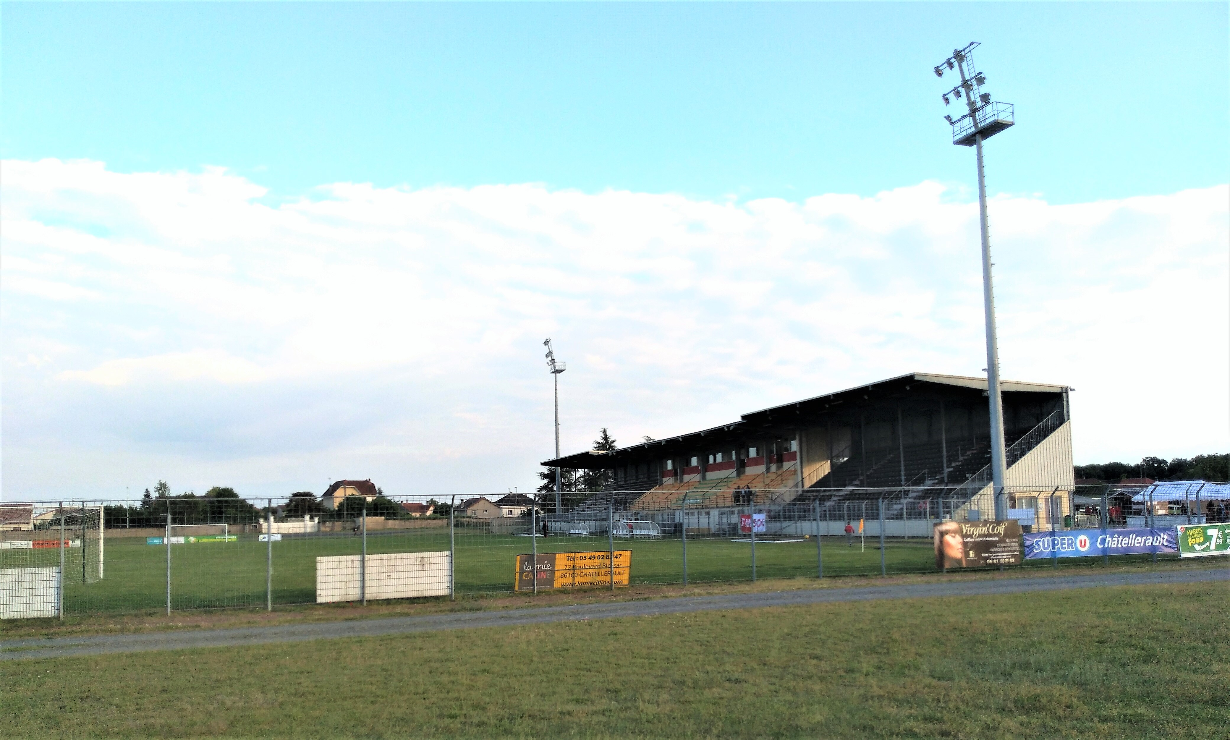 Vue générale du stade de la Montée Rouge de Châtellerault (86100, France), le 25 mai 2019